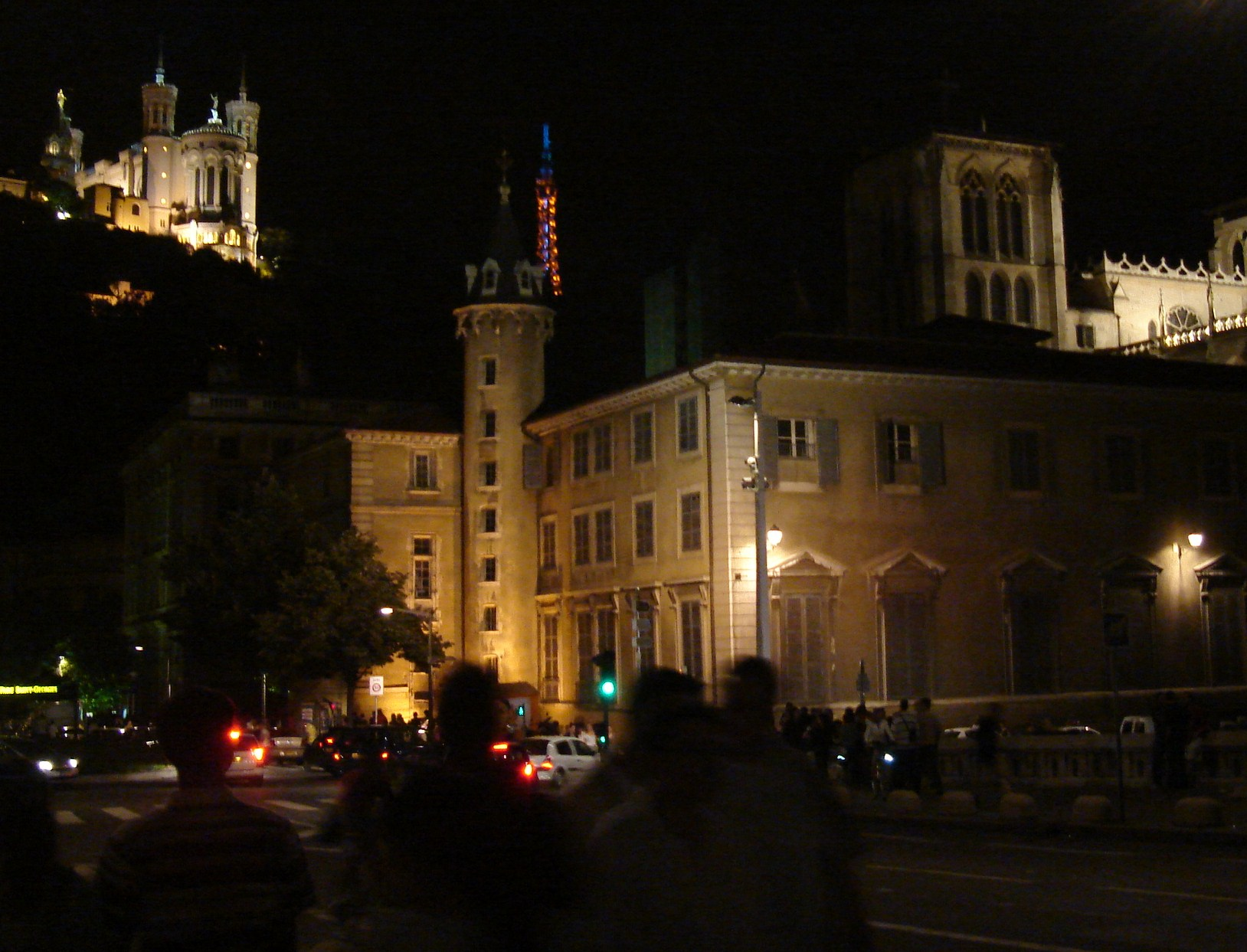 Palais St Jean, ancien archevêché de Lyon reconverti en bibliothèque